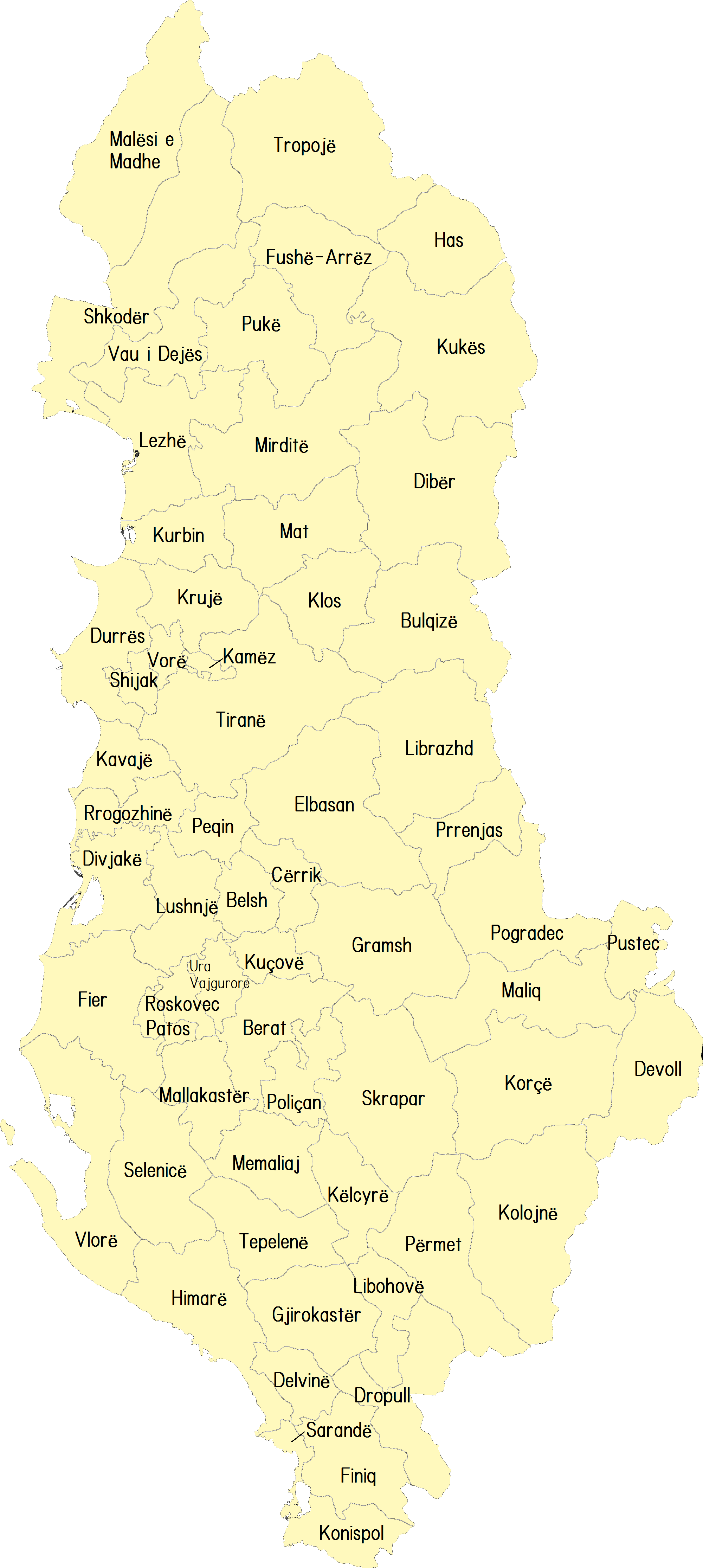 This is a map of municipalities (Albanian: bashki) of Albania./2015年以降のアルバニアの基礎自治体。位置等の確認はreformaterritoriale.alで行った。